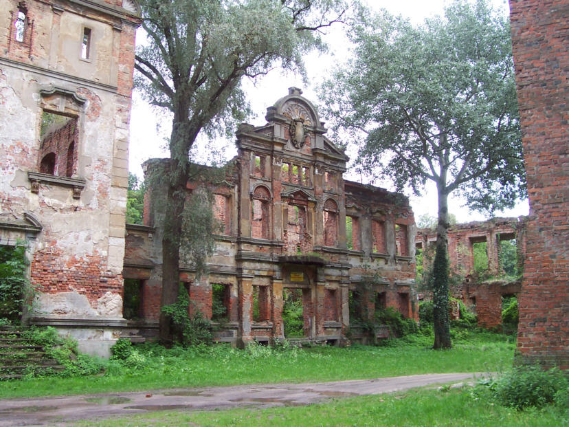 Zamek w Żmigrodzie - elewacja frontowa.